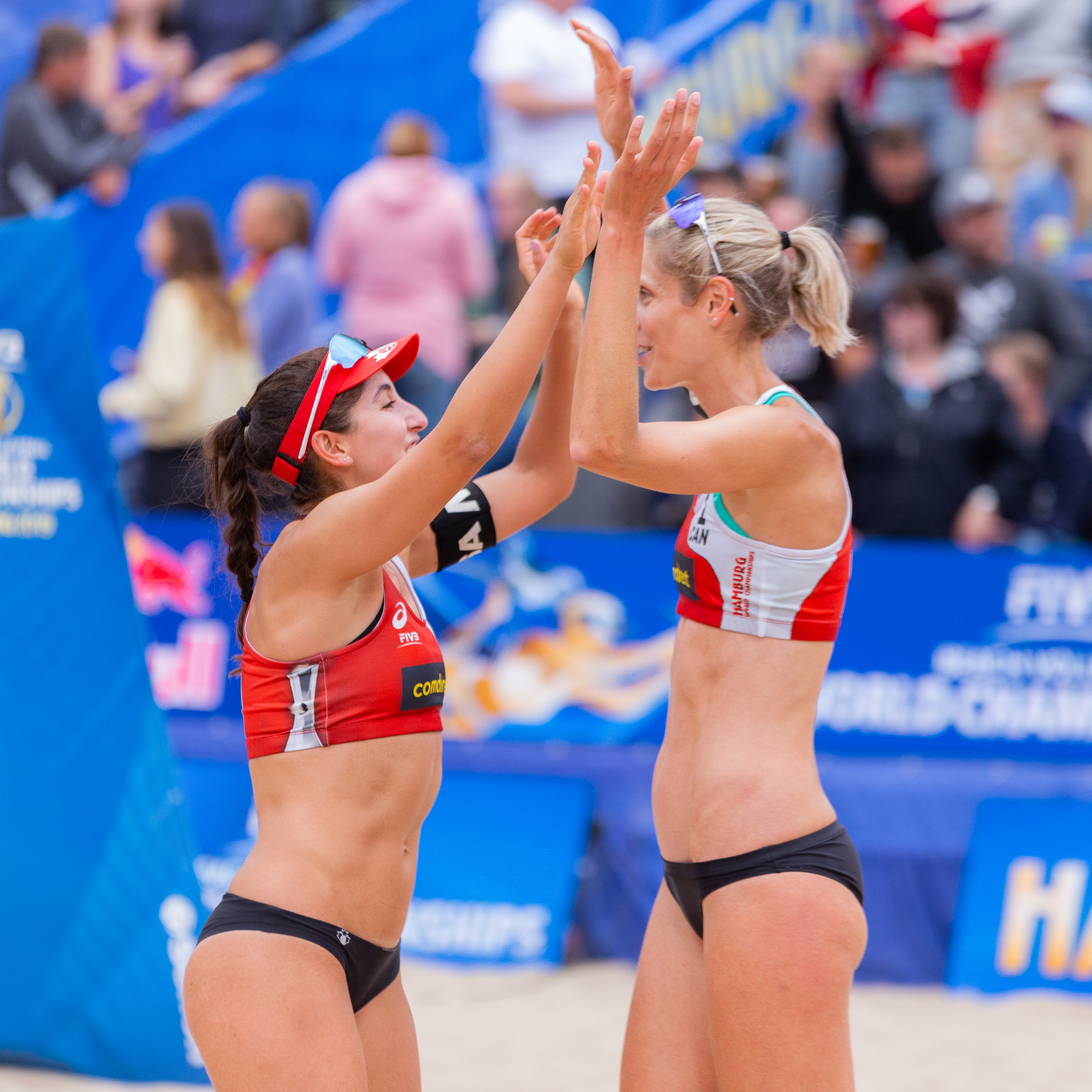 BeachVolleyball Weltmeisterschaft Hamburg 2019; v.li.: Melissa Humana-Paredes (CAN, Kanada), Sarah Pavan (CAN, Kanada); Jubel, celebration